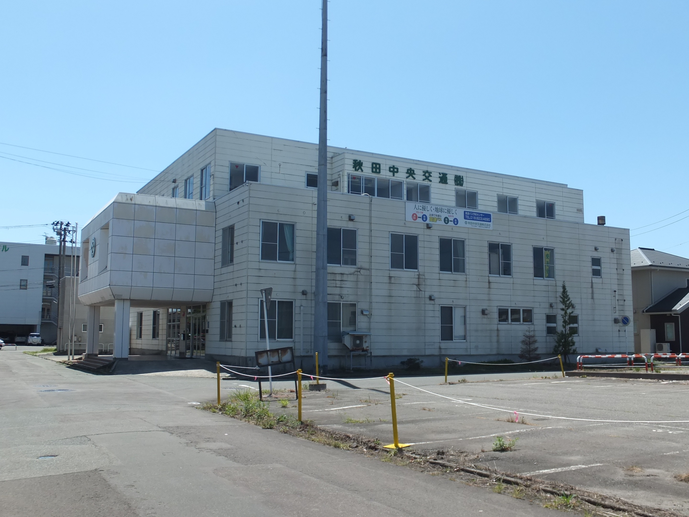 秋田中央交通本社 （秋田市川元山下町）